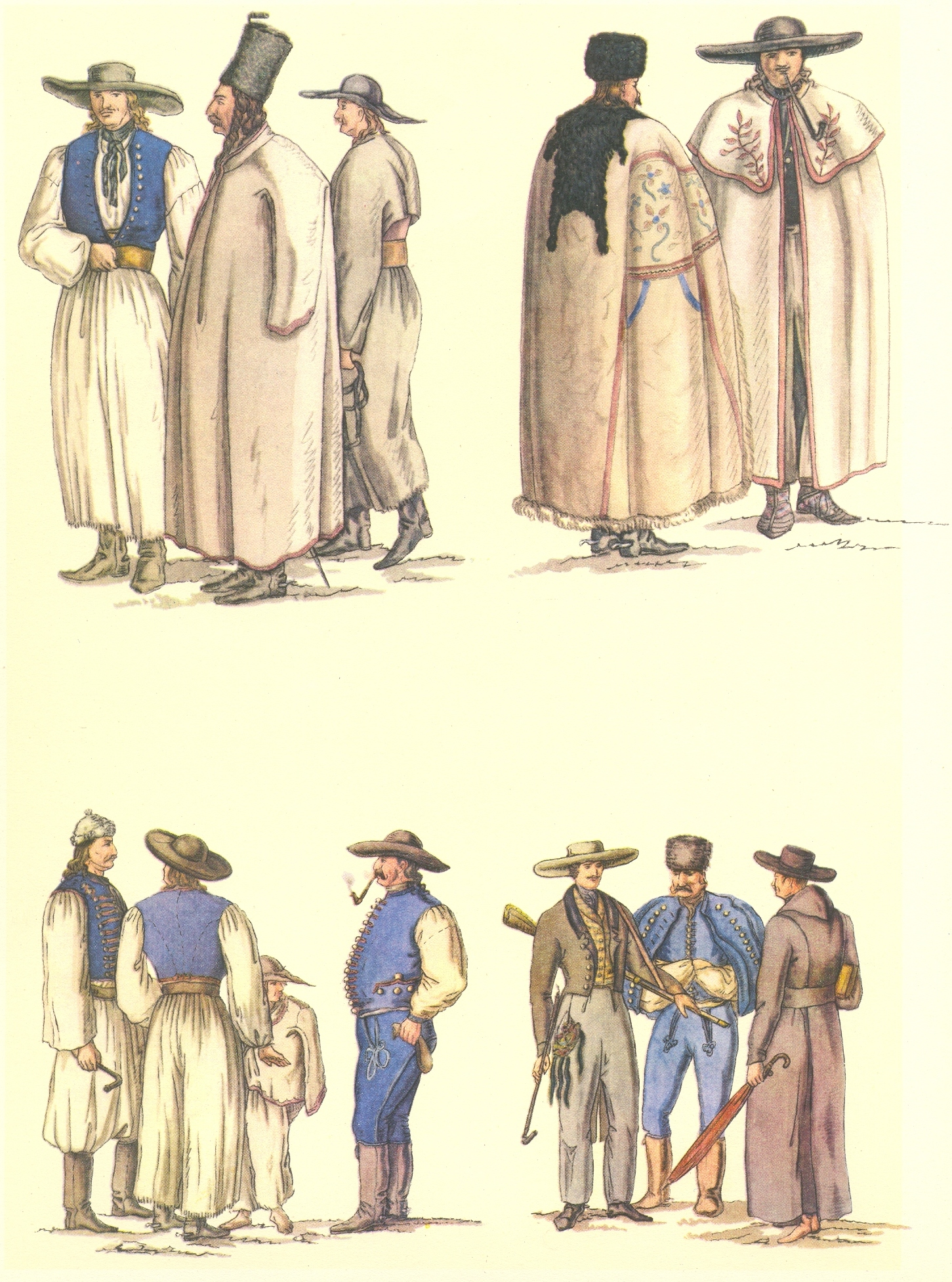 Adony. Birisch. Ratz Gran. Edelman. Pfaf. Vízfestmény, 1822